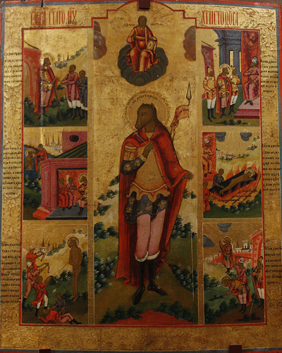 святой Христофор с житием